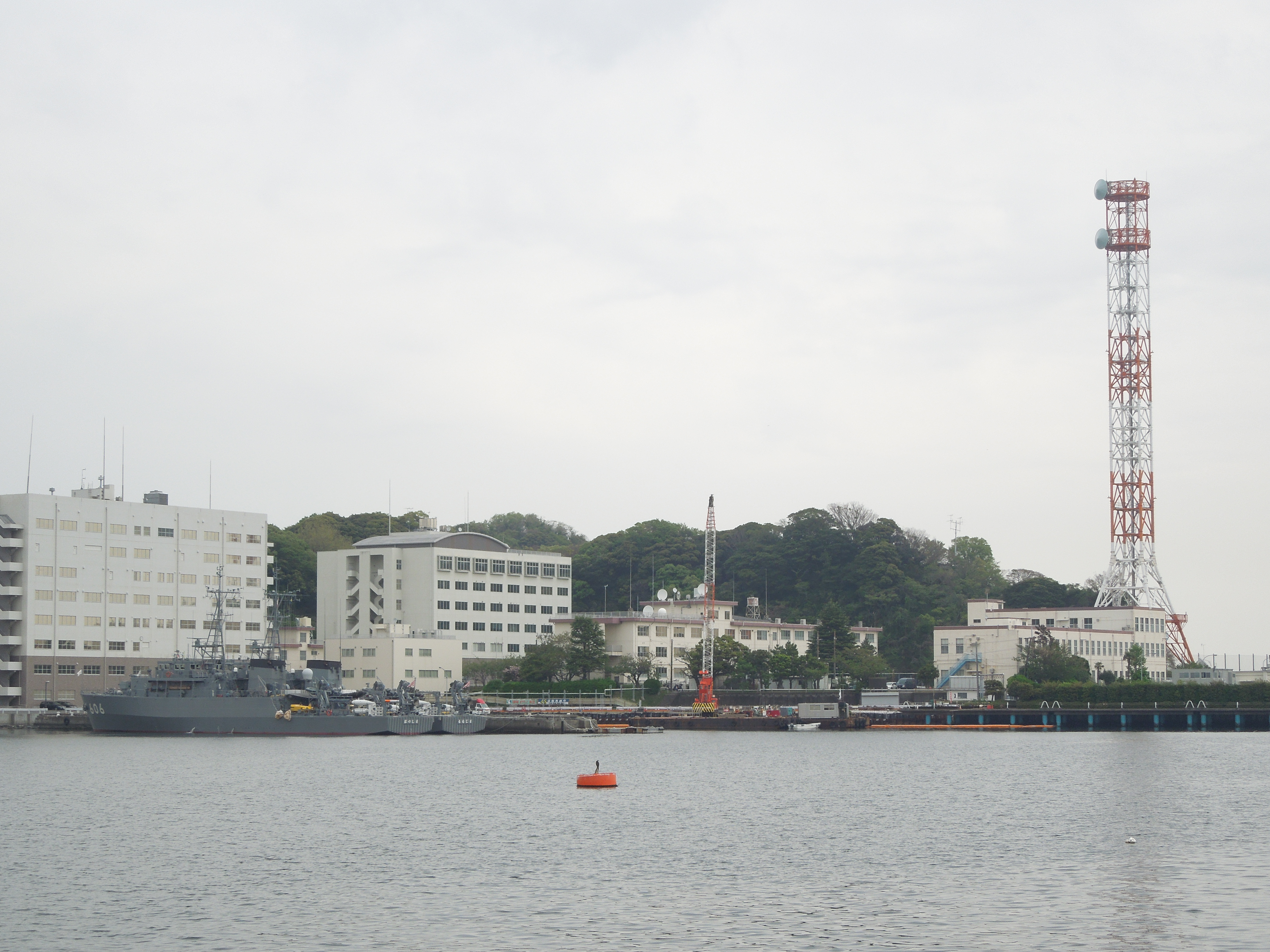 海上自衛隊船越基地